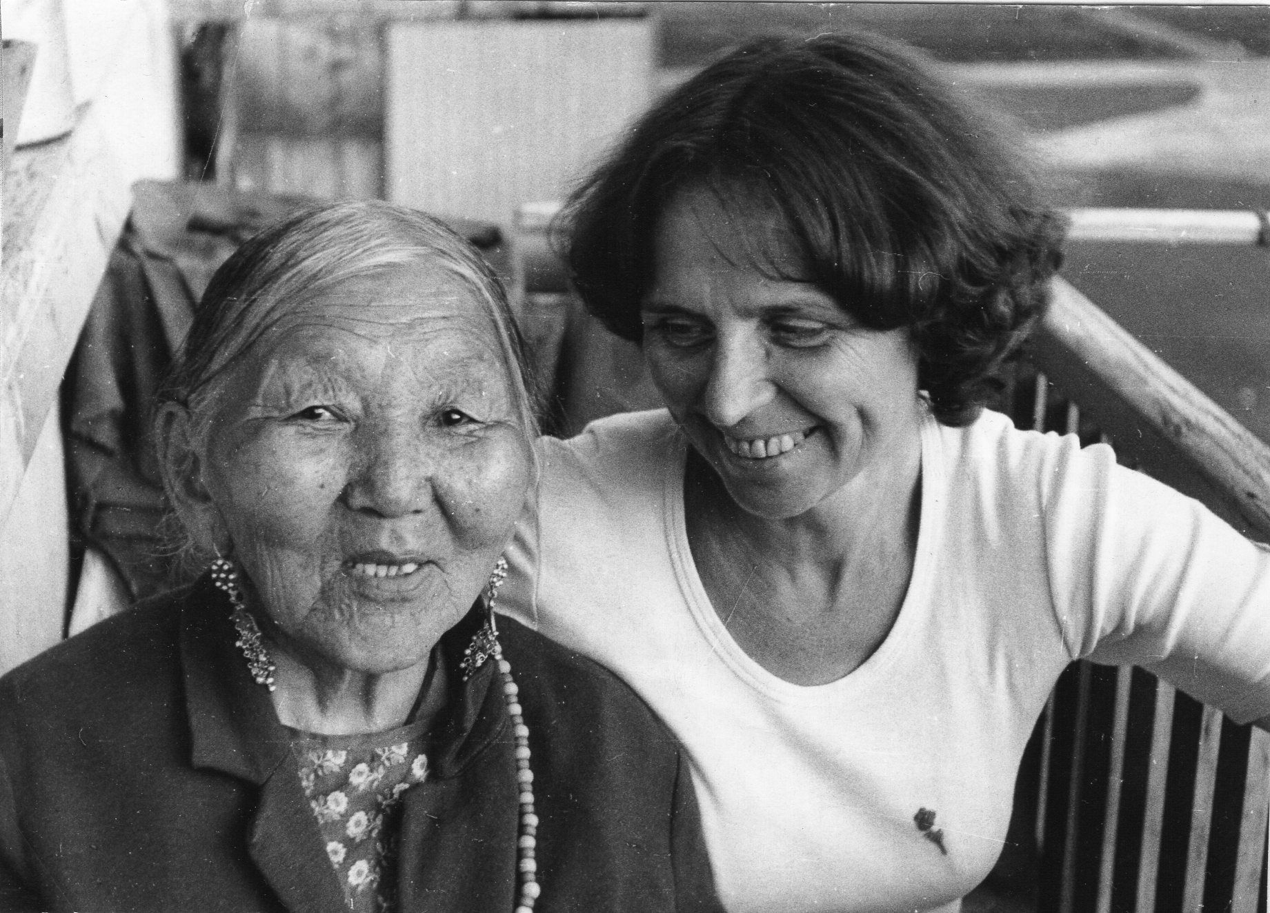 Erika Taube mit Balsyn, 1982